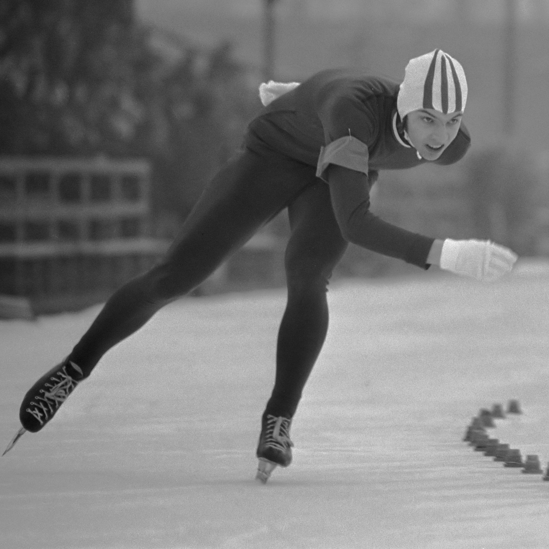 Wereldkampioenschappen schaatsen junioren te Assen, Jan Heida (Nederland) in aktie 20 januari 1973